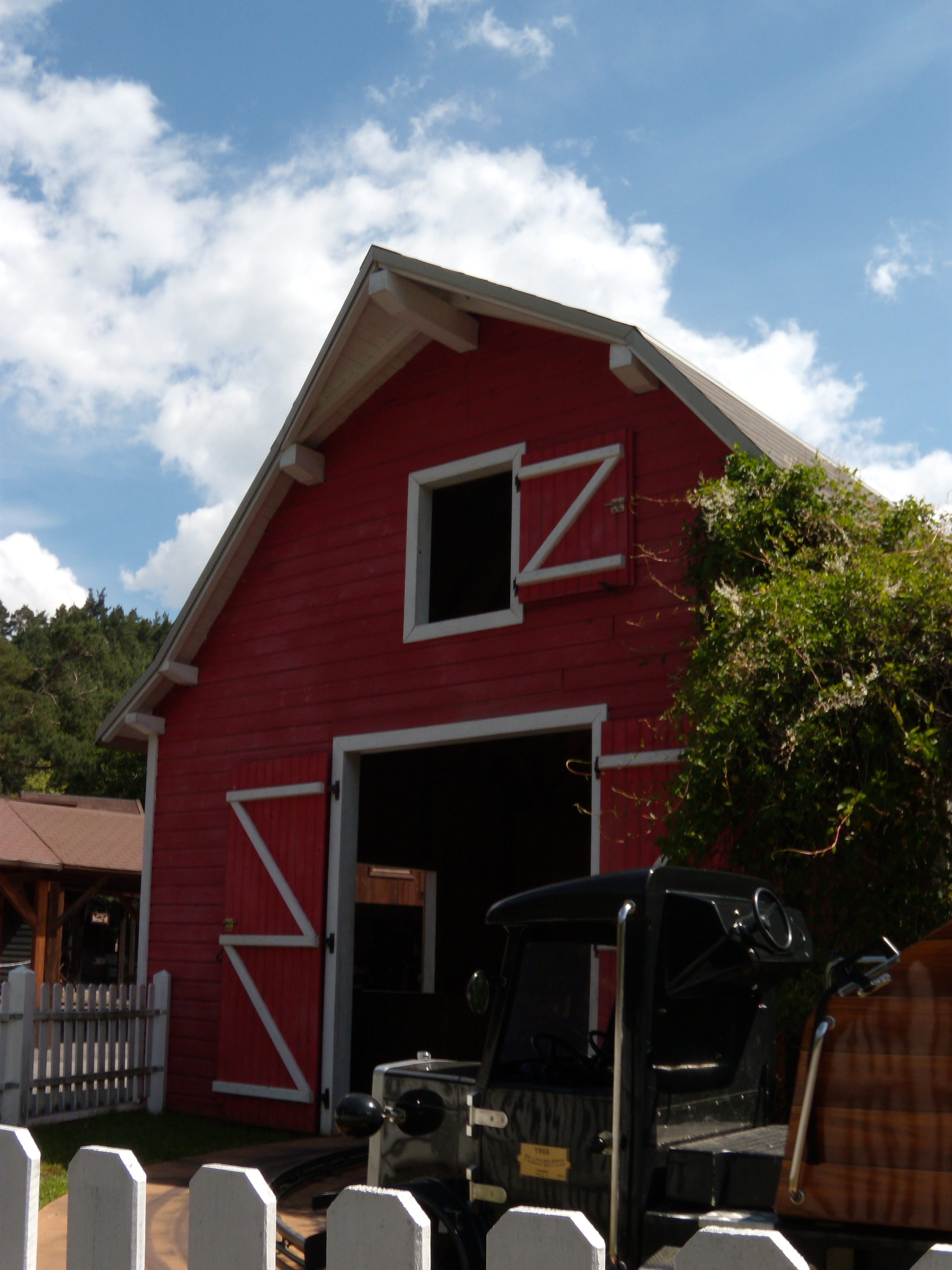 L'attraction Old America à Fraispertuis-City